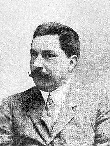 Joan Miquel i Avellí, alcalde de Palafrugell i industrial surer